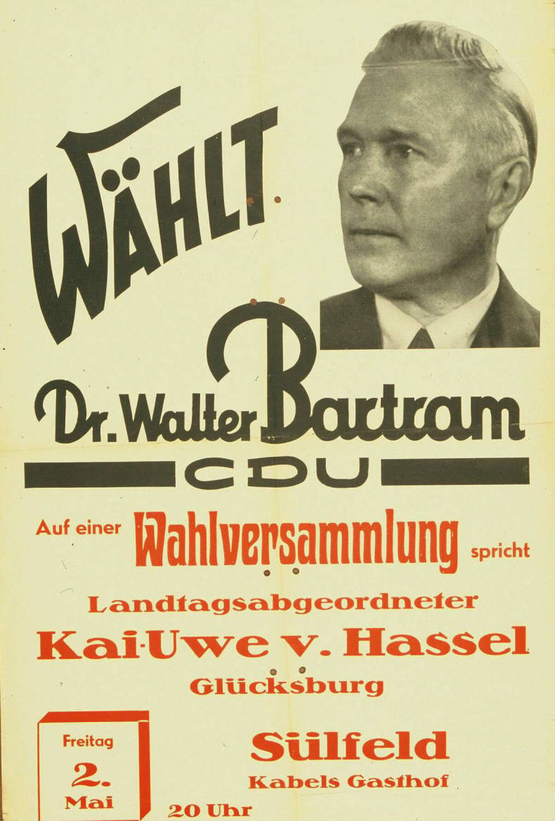 Wählt Dr. Walter Bartram CDU Auf einer Wahlversammlung spricht Landtagsabgeordneter Kai-Uwe v. Hassel Abbildung: Porträtfoto Plakatart: Ankündigungsplakat Drucker_Druckart_Druckort: Padderatz & Rahe, Neumünster Objekt-Signatur: 10-001: 222 Bestand: Plakate zu Bundestagswahlen (10-001) GliederungBestand10-18: Plakate zu Bundestagswahlen (10-001) » Die 1. Bundestagswahl am 14. August 1949 » Nachwahlen » CDU Lizenz: KAS/ACDP 10-001: 222 CC-BY-SA 3.0 DE